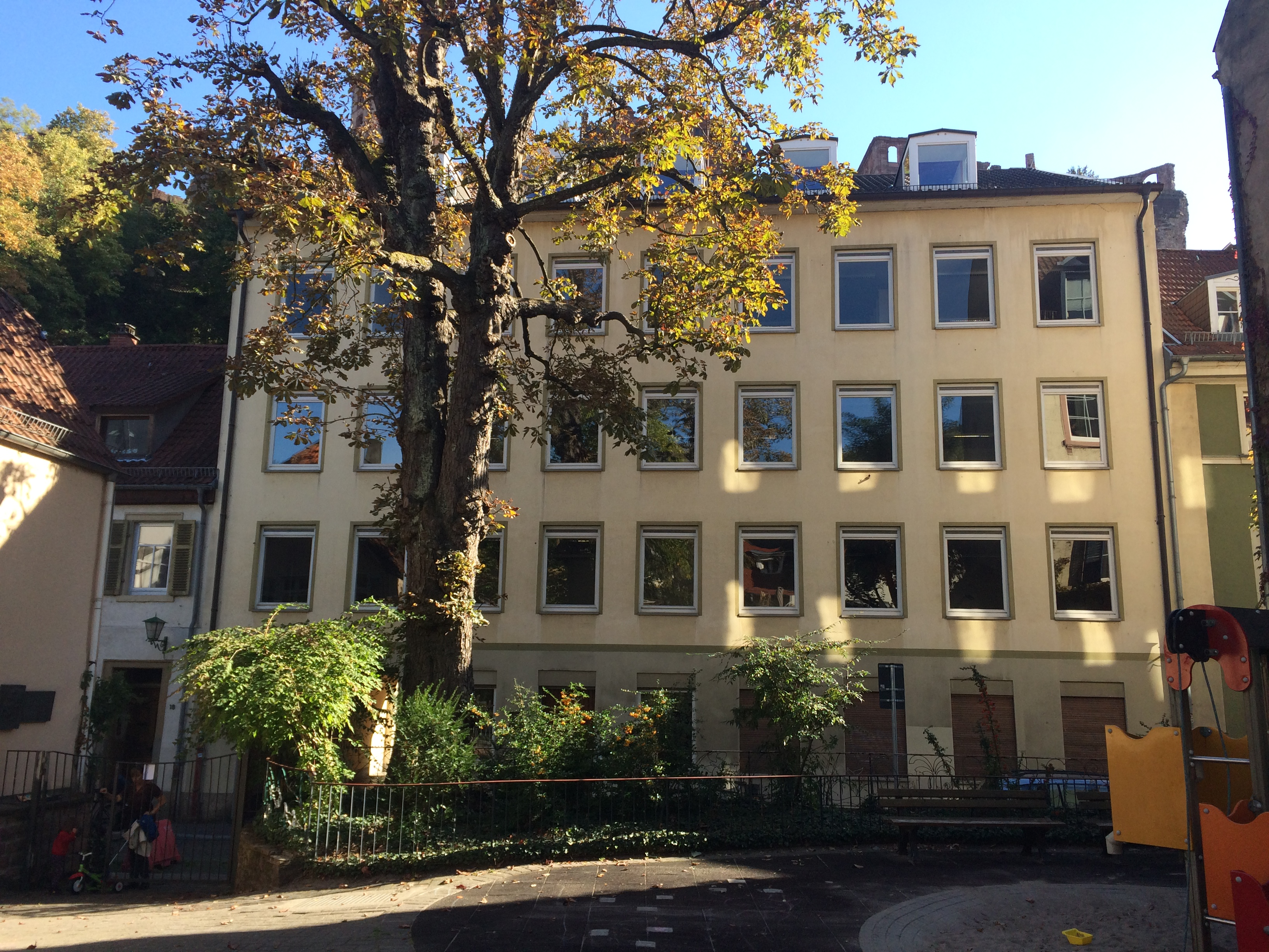 Gebäude der Theologischen Fakultät unterhalb des Heidelberger Schlosses mit Räumen des Instituts . Quelle: eigenes Foto